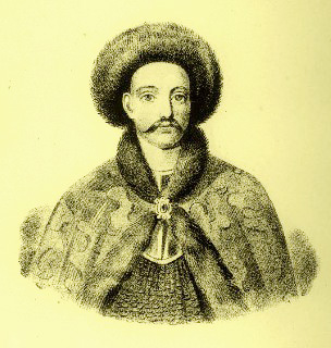 Всеволод I Ярославич